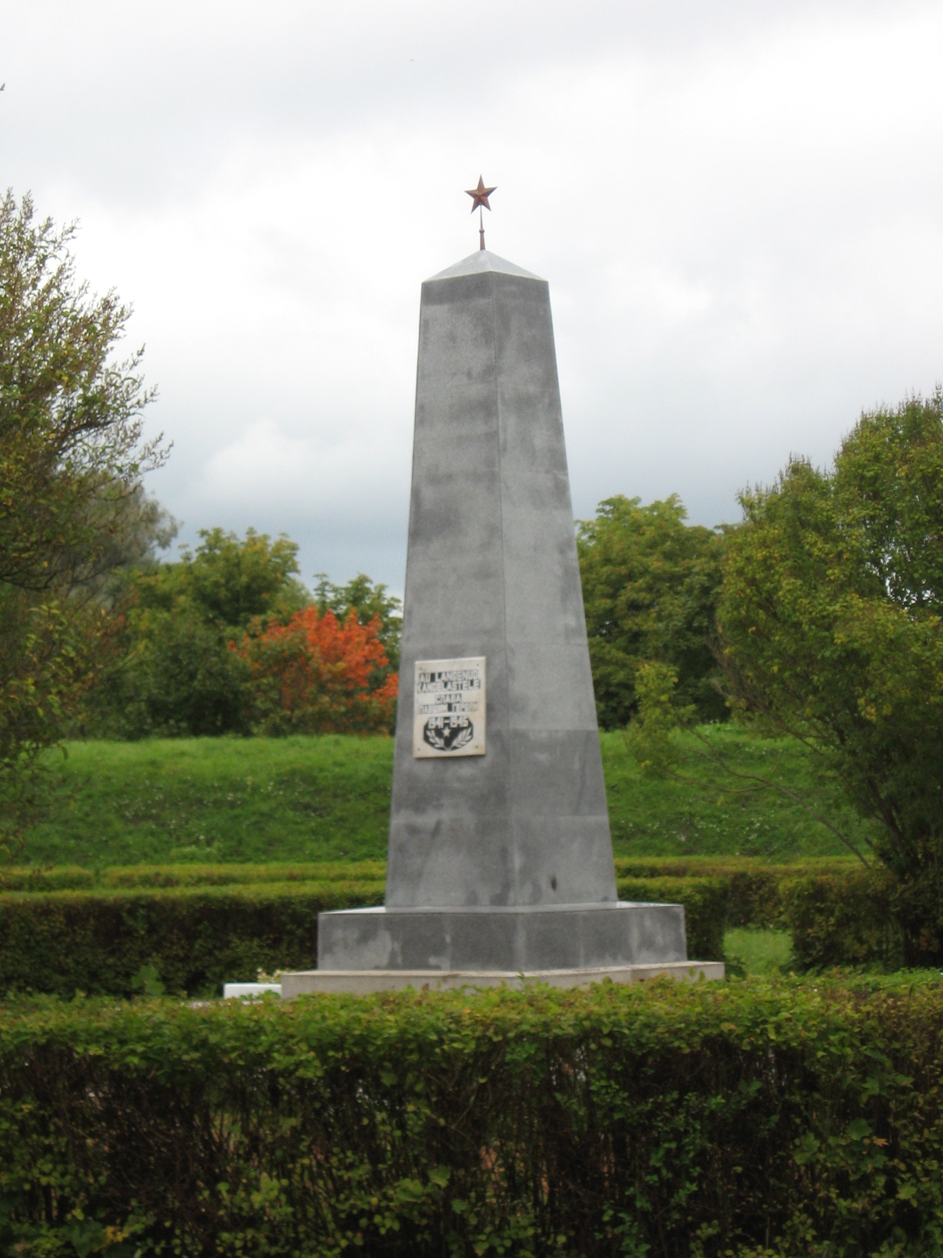 II maailmasõjas hukkunute ühishaud